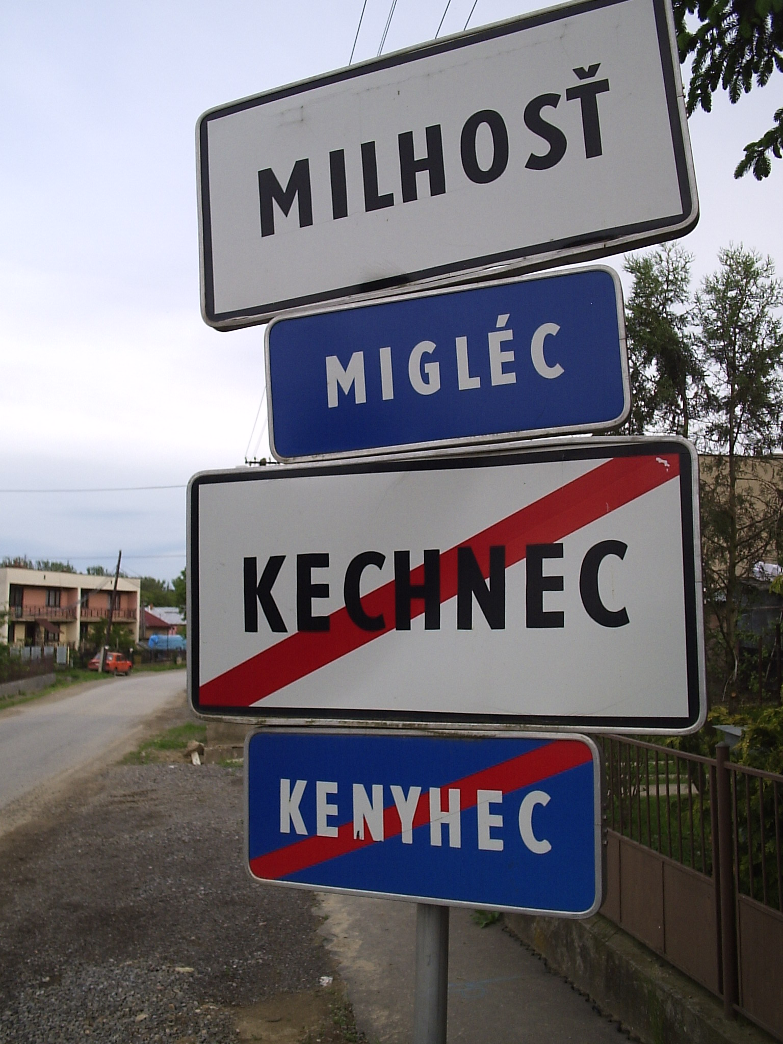 Falu kezdete kétnyelvű táblákkal (Migléc)